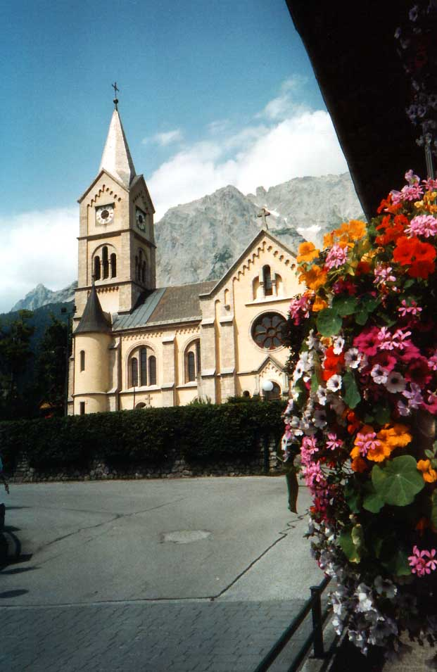 Evangelische Kirche in Ramsau am Dachstein